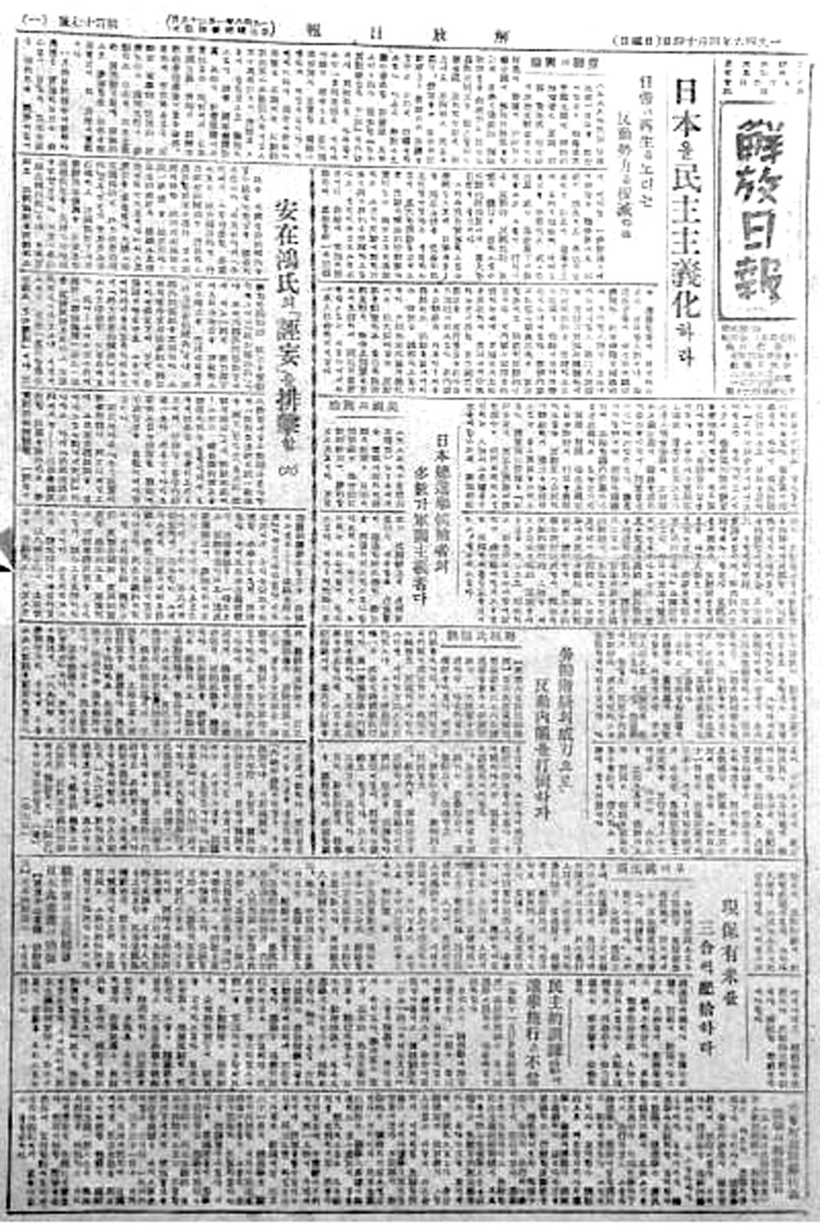 해방일보